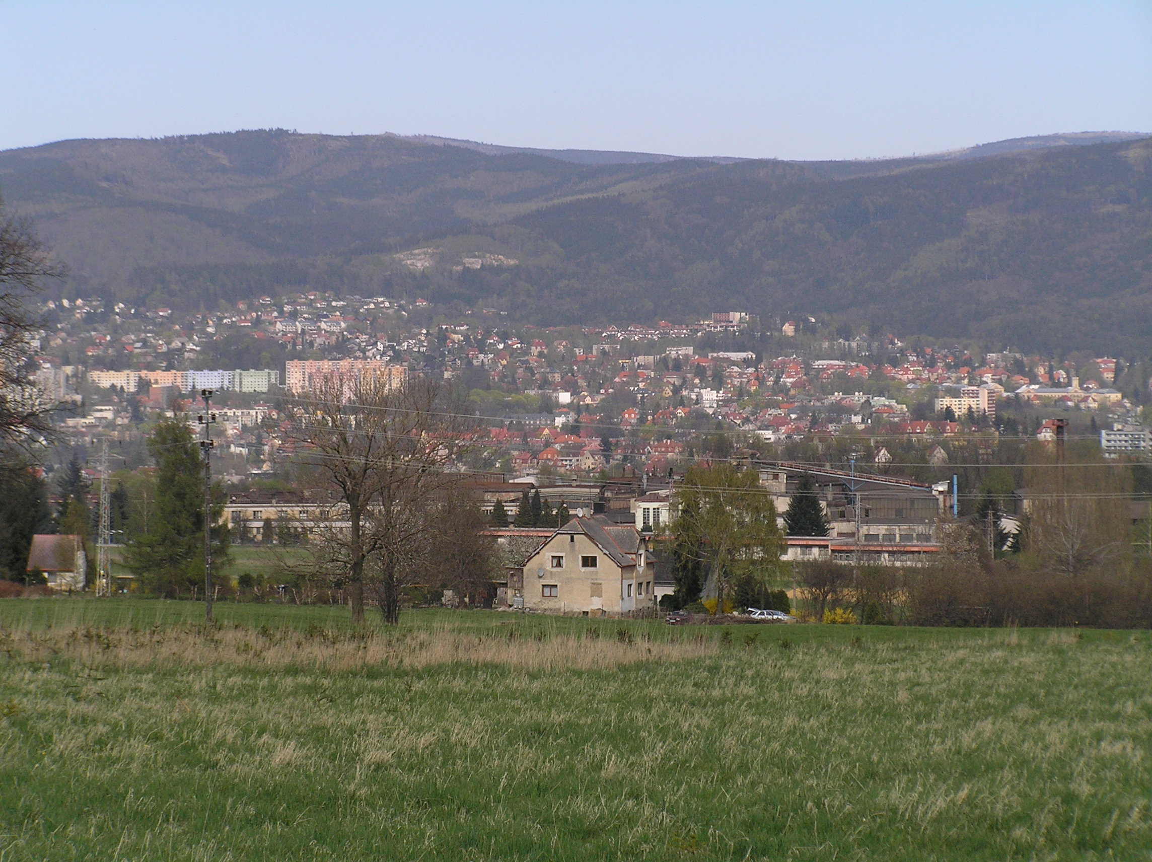 Pohled z cesty od Karlinek do Horního Hanychova k Liberci